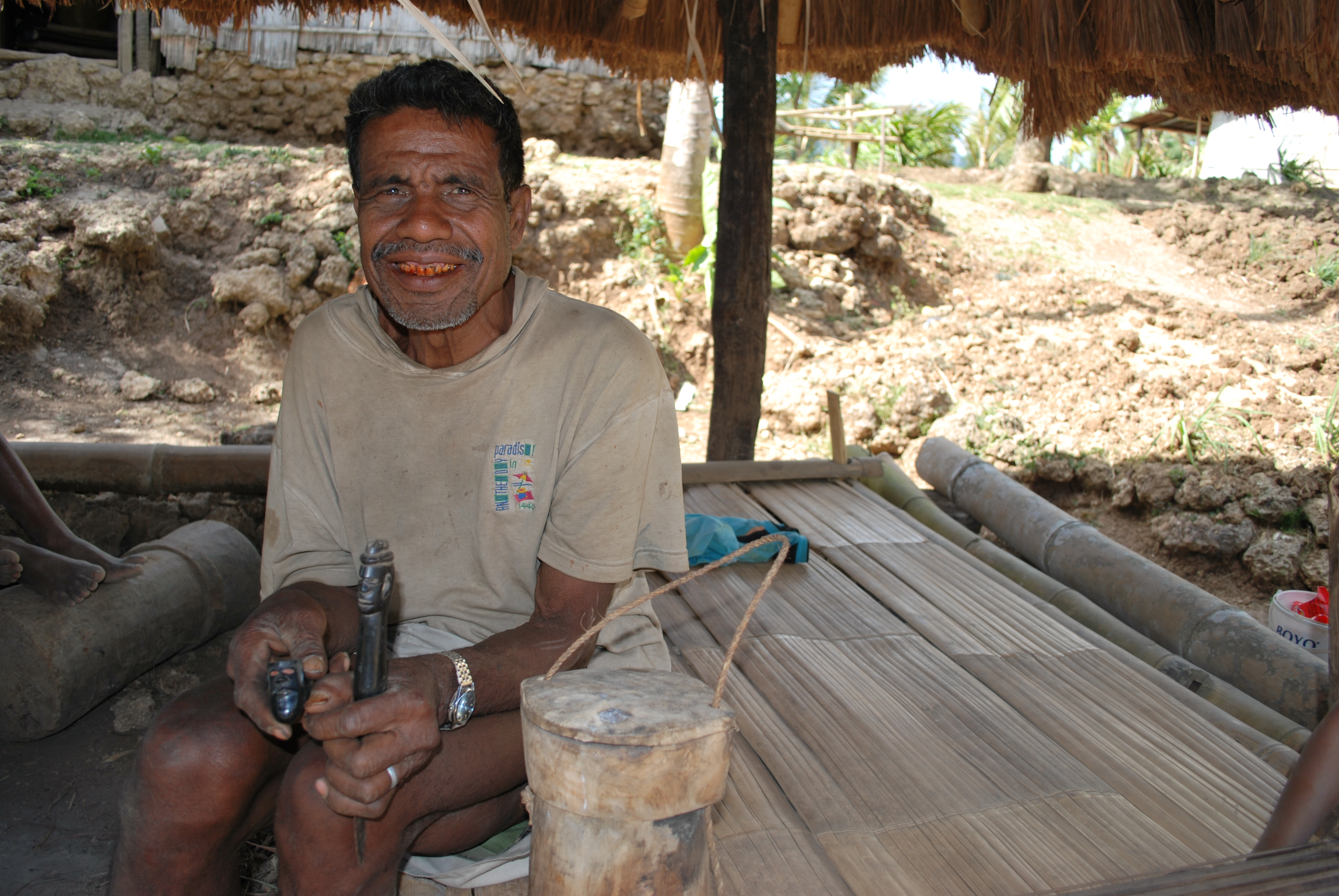 Mann mit Pfeifen in Suco Fatulia, Venilale